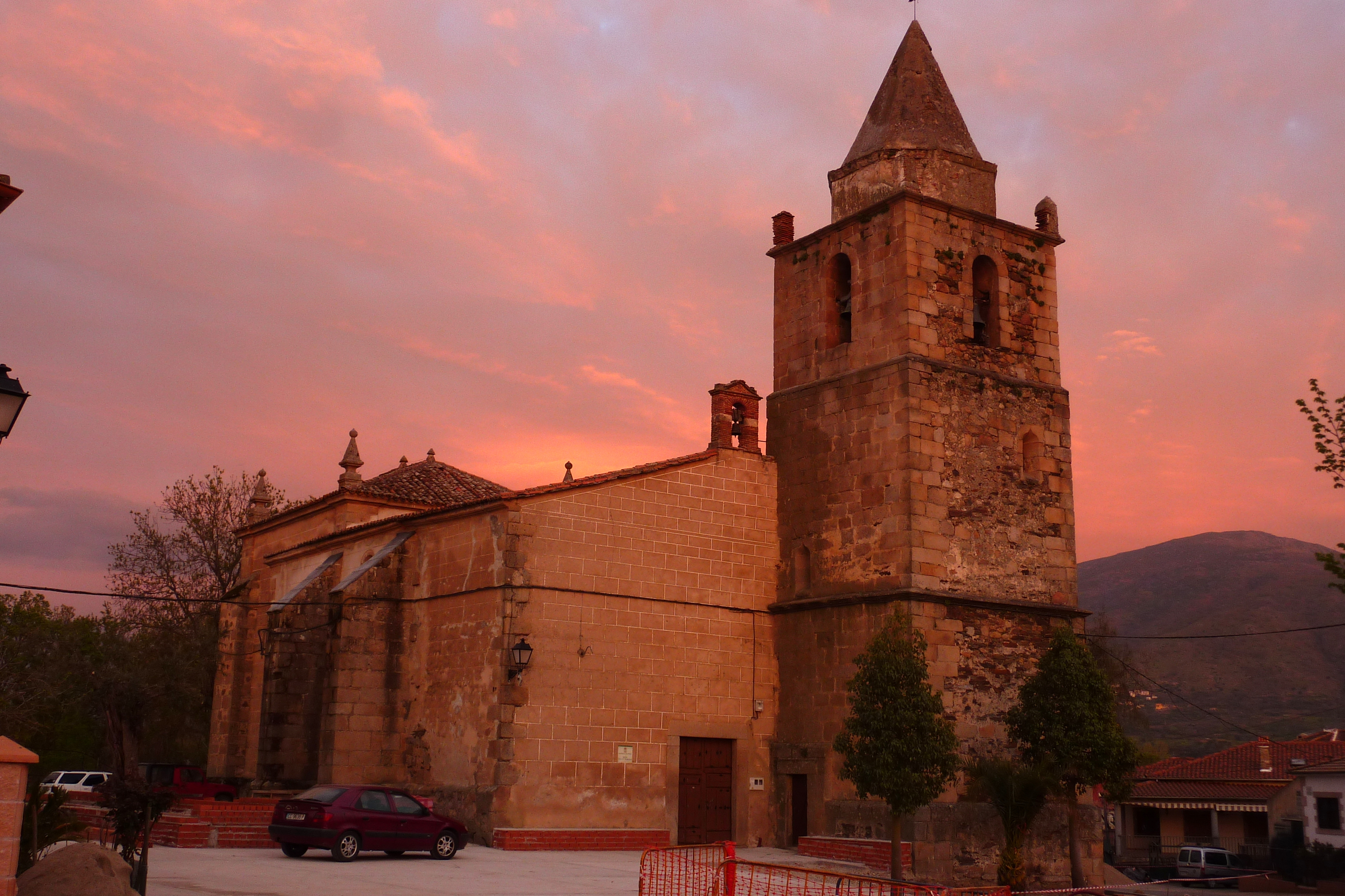 La Granja - church at sunset